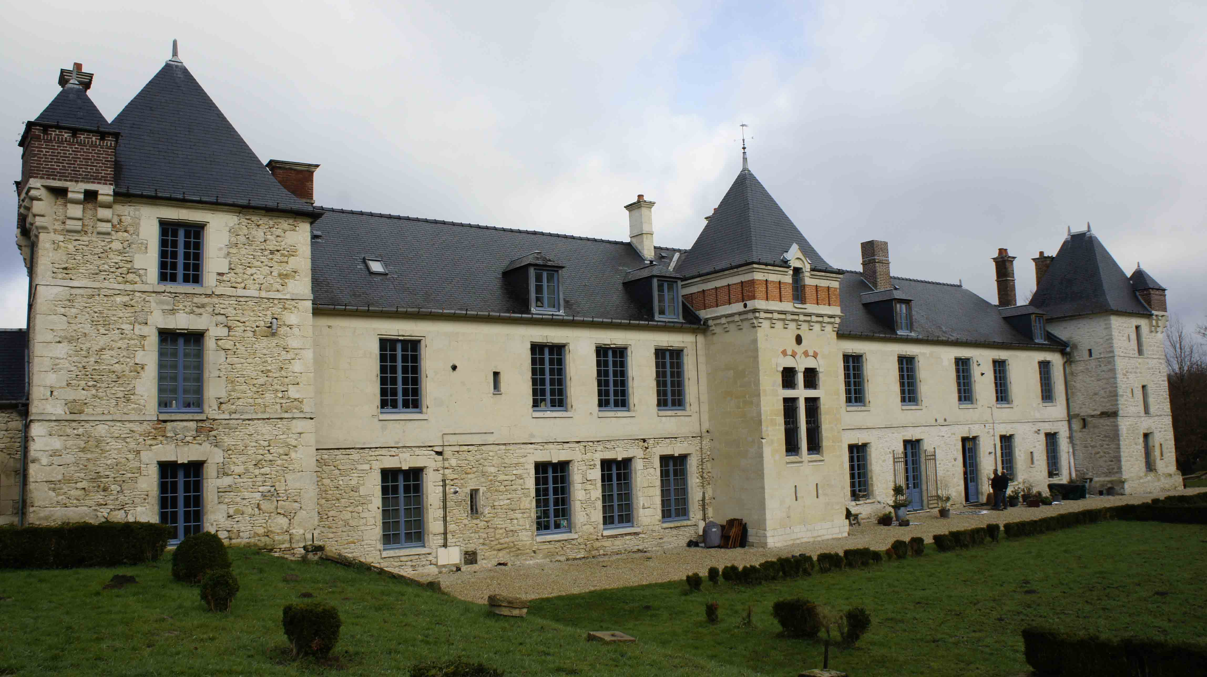 vue du Château de Festieux avec jardin à la française, c'est le côté donnant vers la forest .